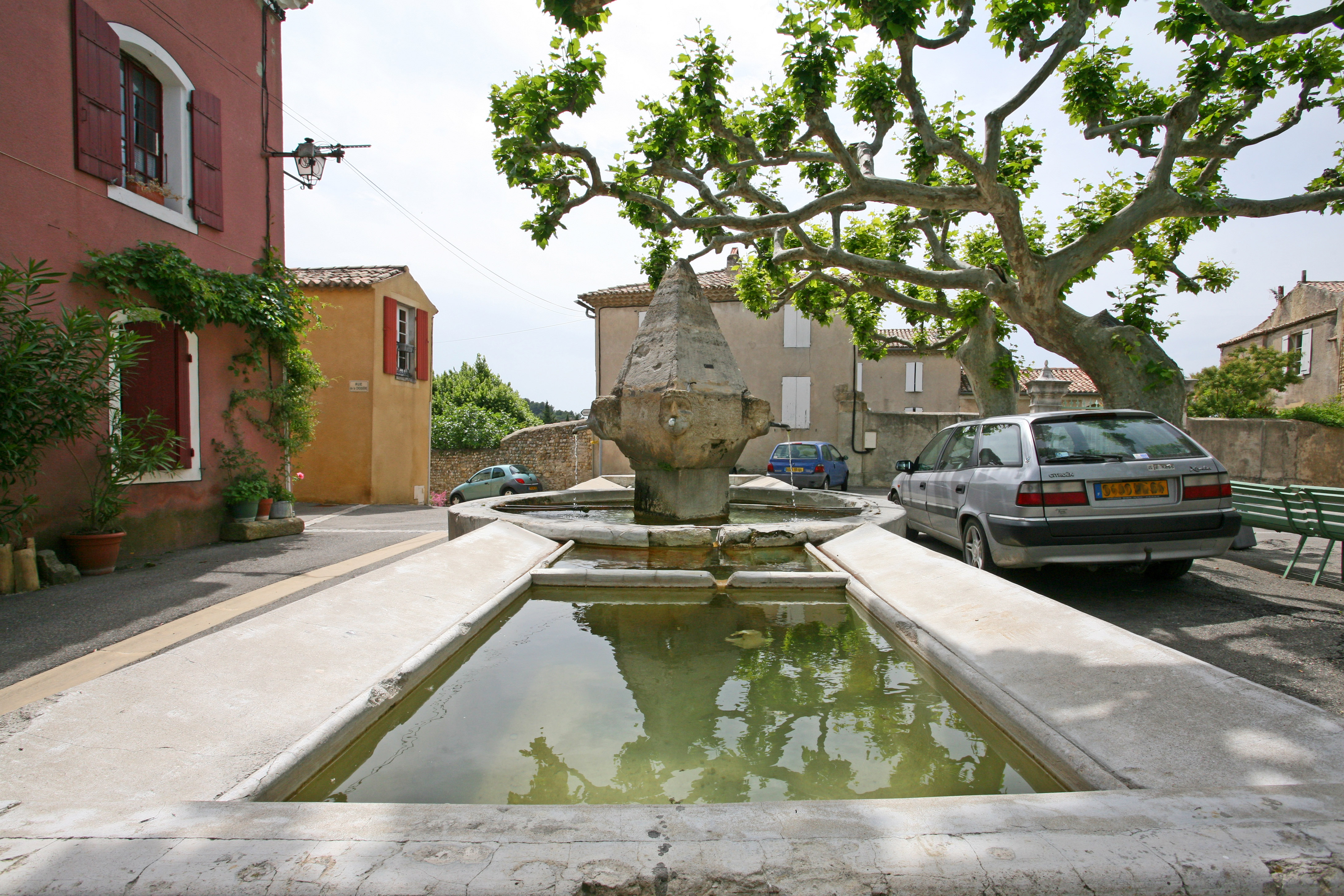 Buisson (Vaucluse)